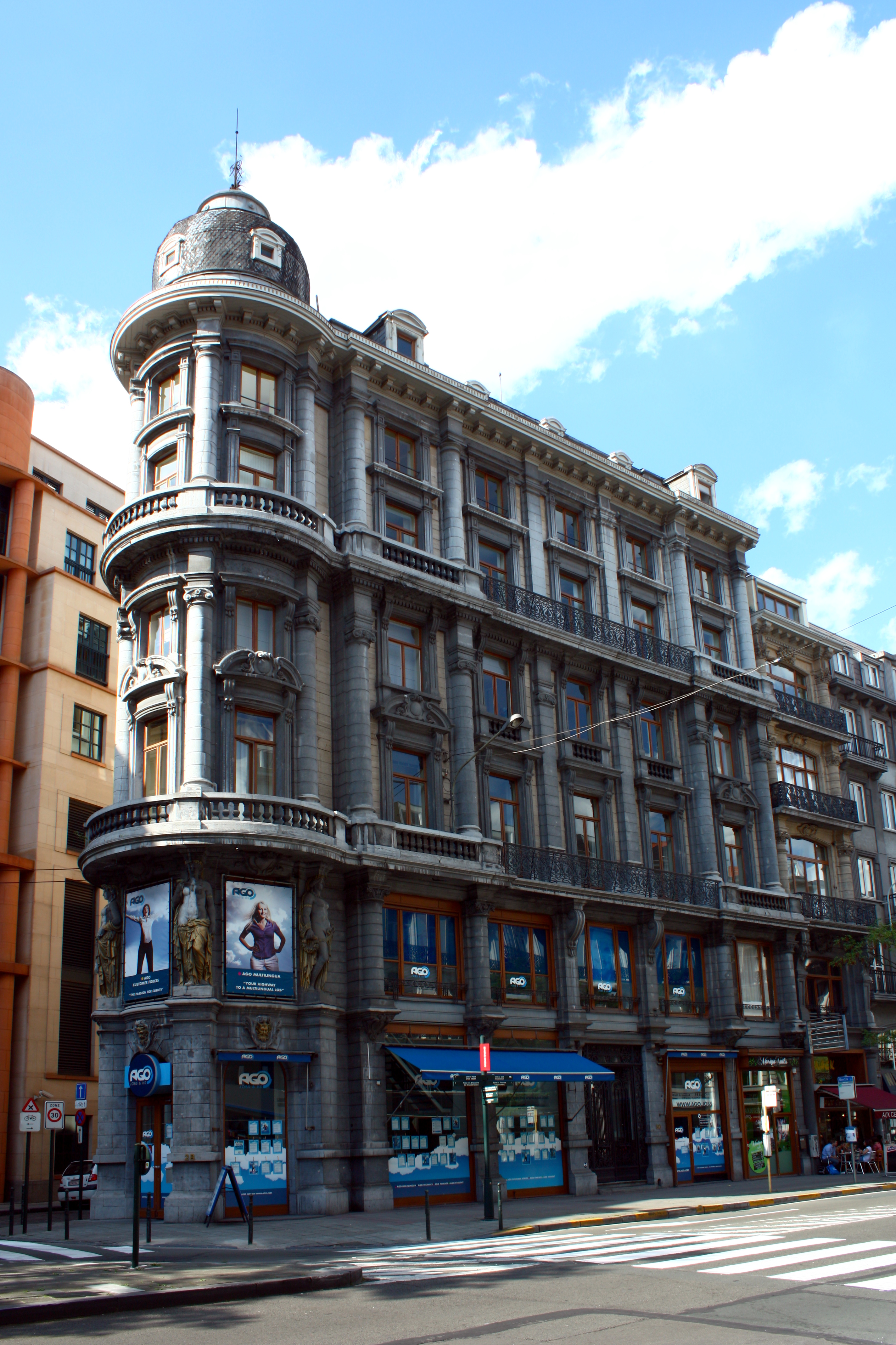 Immeuble de rapport situé Boulevard Adolphe Max 28 - 34. Monument classé n°2043-0229/0